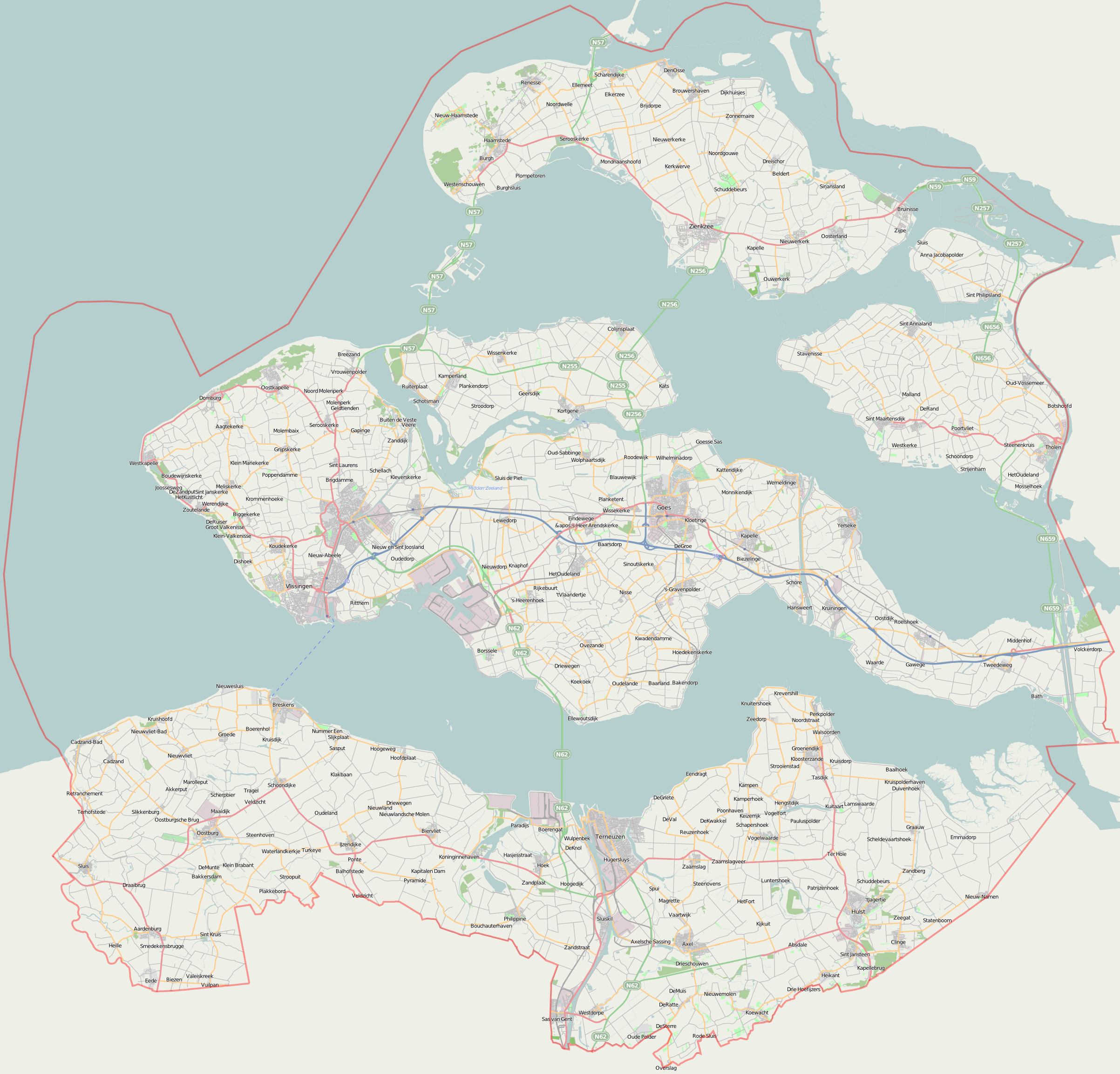 "Zeeland"